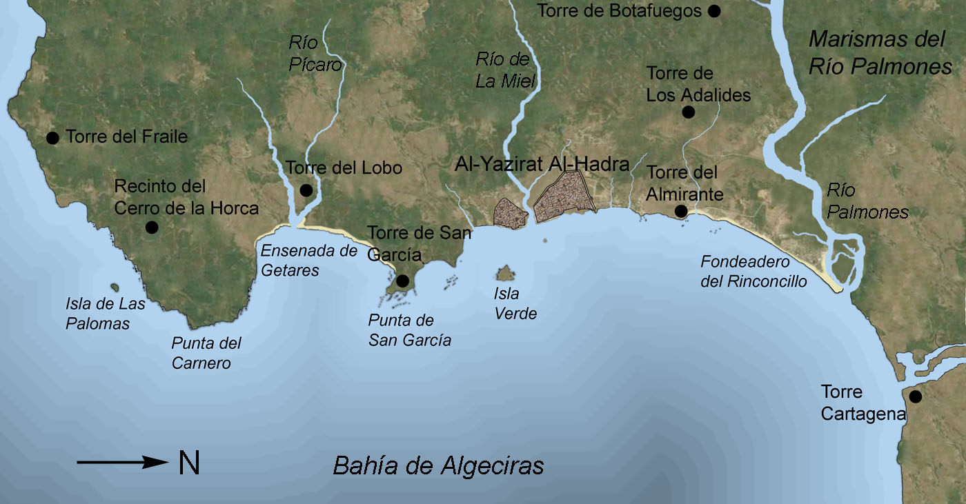 Mapa indicativo de los accidentes geográficos de Algeciras en época medieval